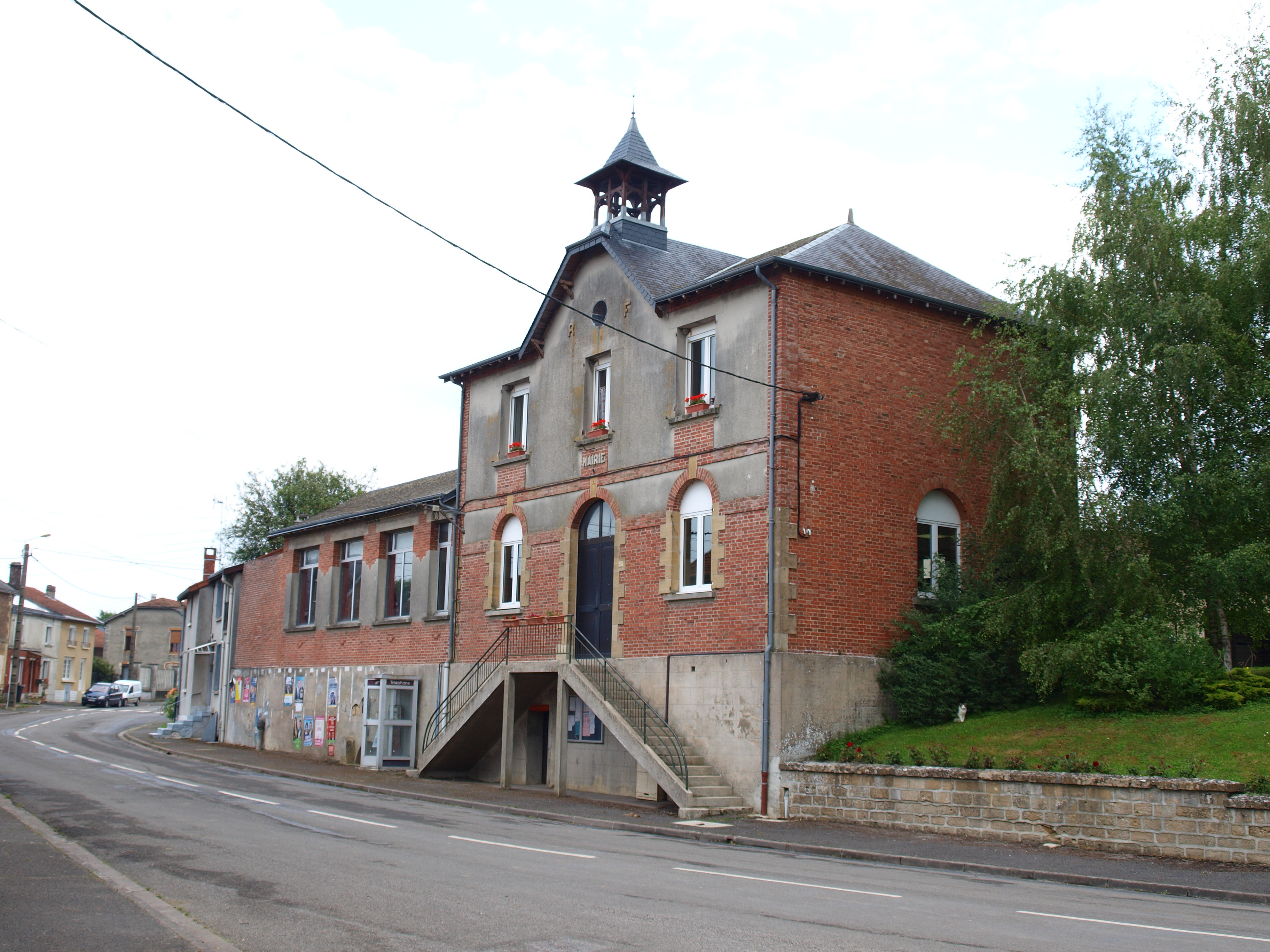 Falaise (Ardennes, France) ; mairie